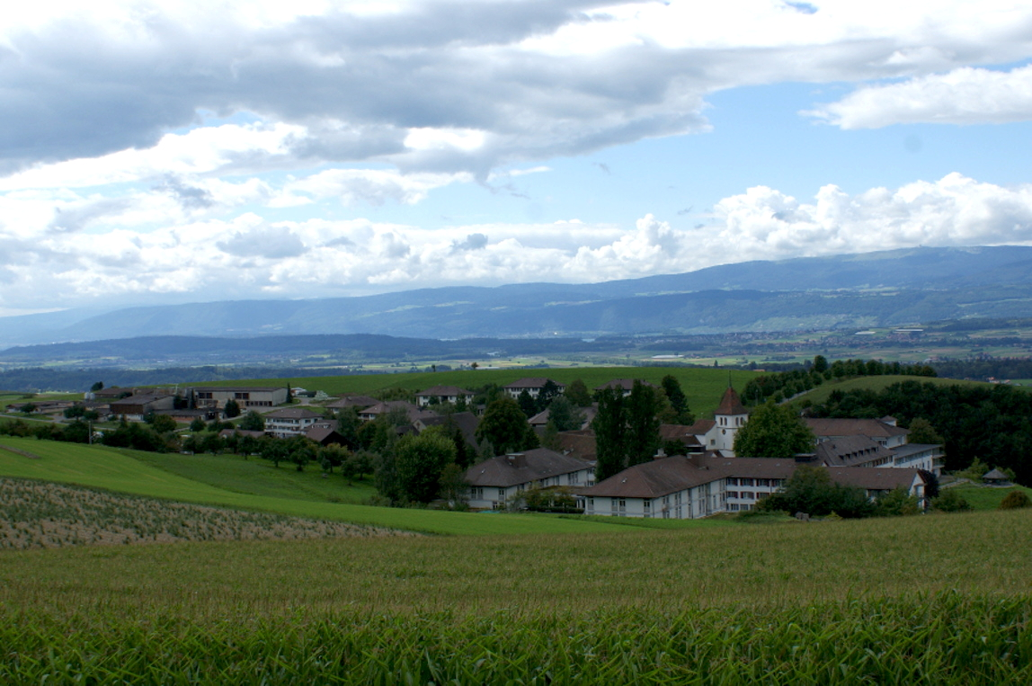 Frienisberg BE - Hintergrund Berner Seeland und Jura